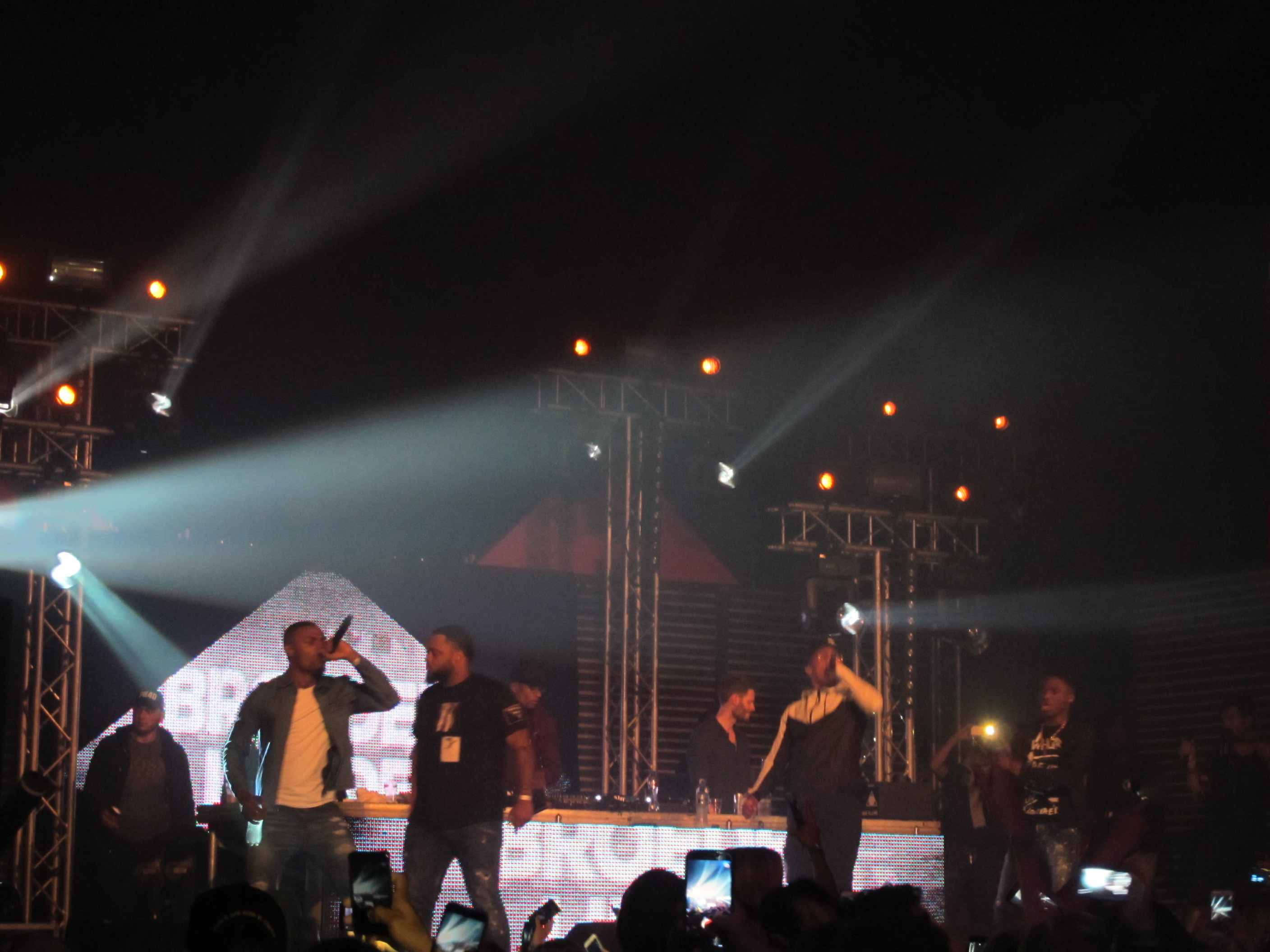 Broederliefde op Huntenpop 2016.